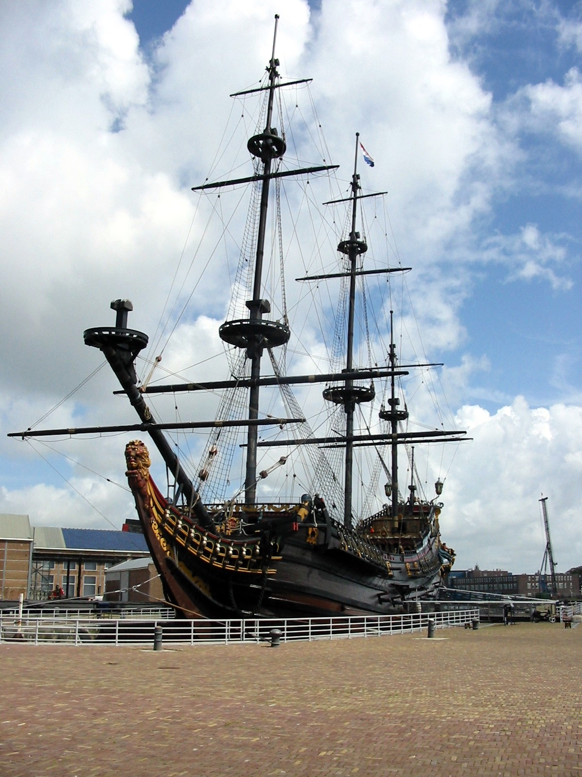 Replica VOC-schip Prins Willem (voorzijde).